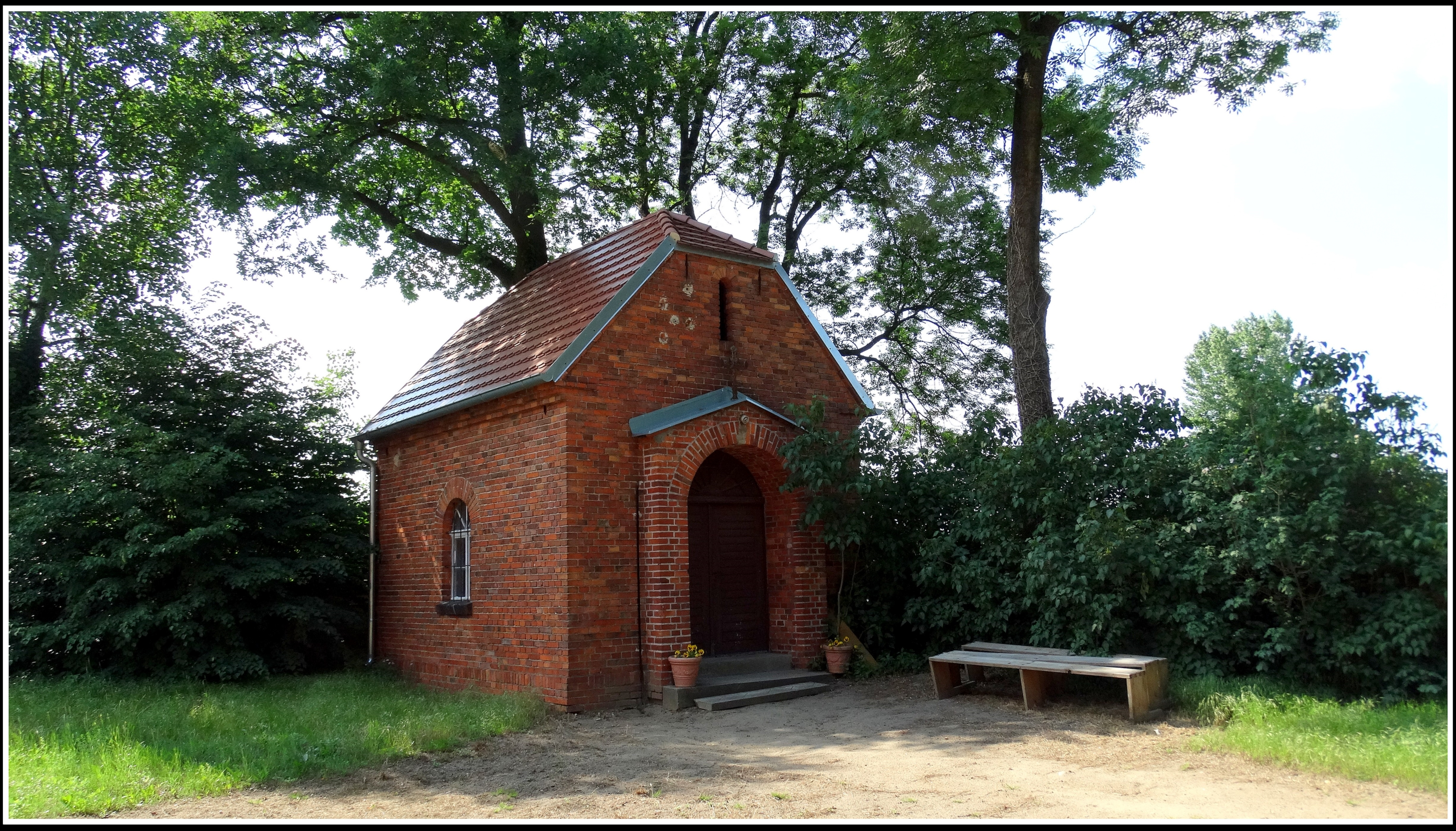 Trzebosz - kaplica przedpogrzebowa z pocz. XVIII w. e zespole kościoła